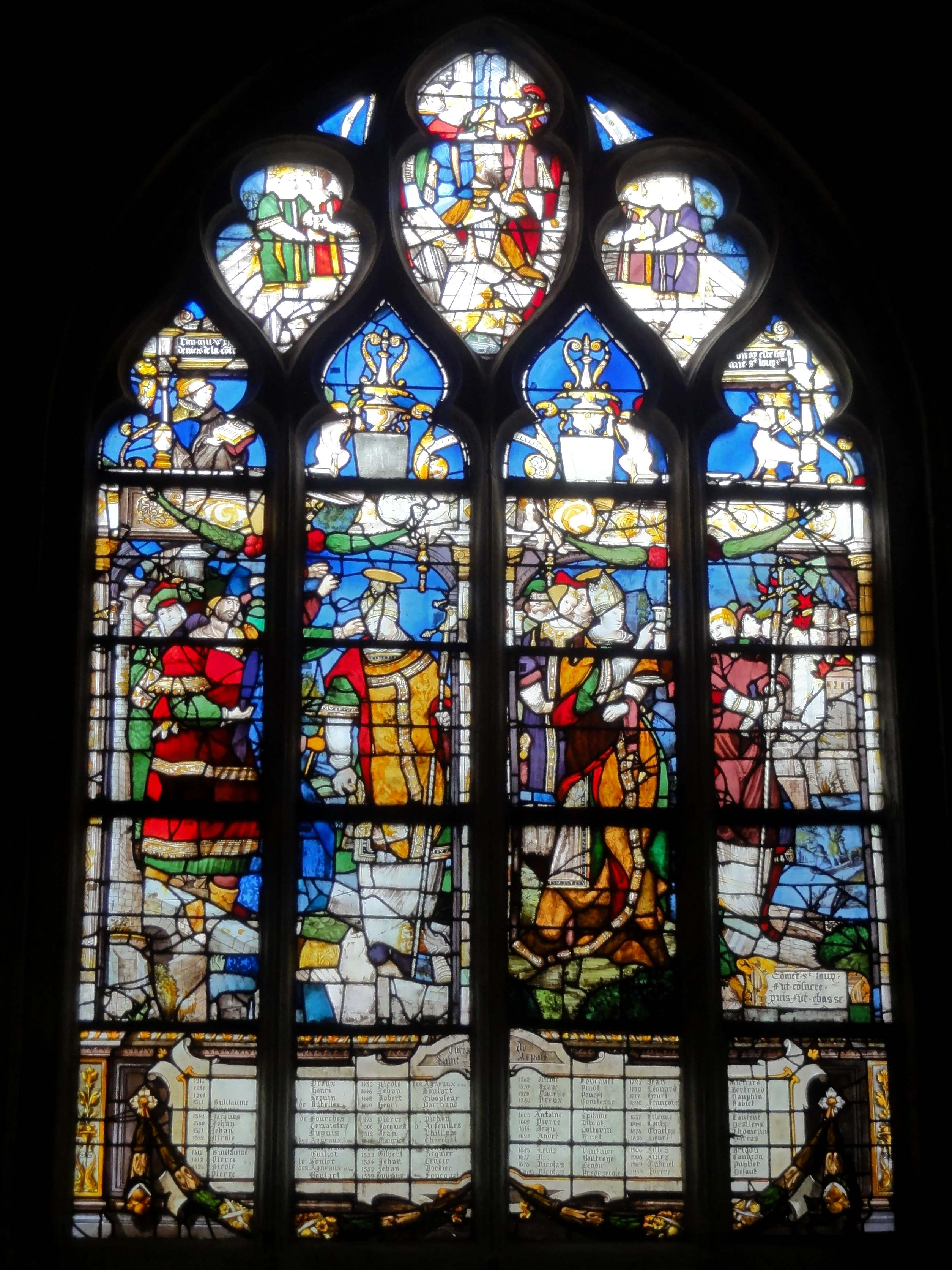 Vitrail de saint Loup de Sens.